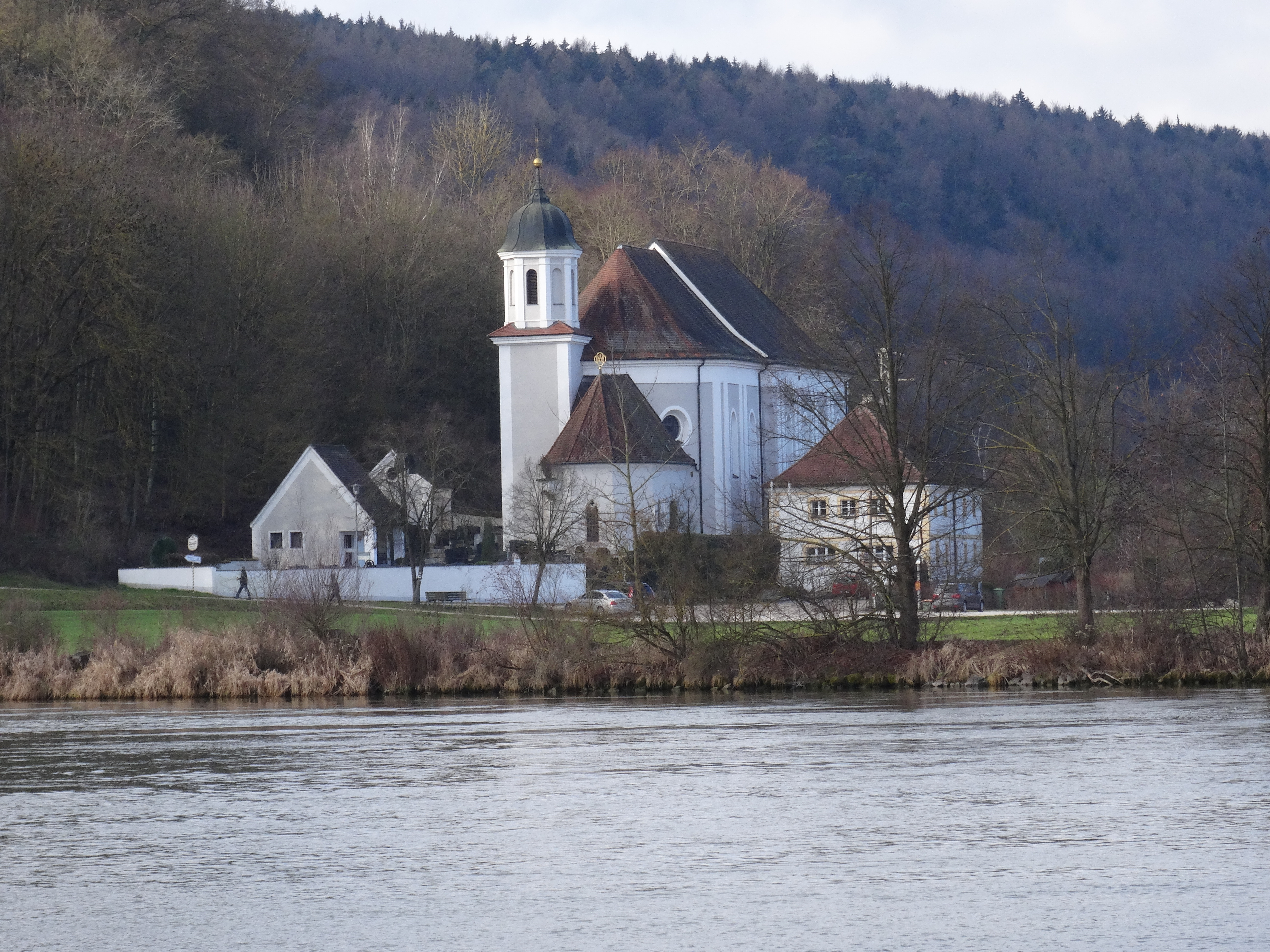 Die katholische Wallfahrtskirche Mariä Himmelfahrt in Mariaort bei Regensburg.